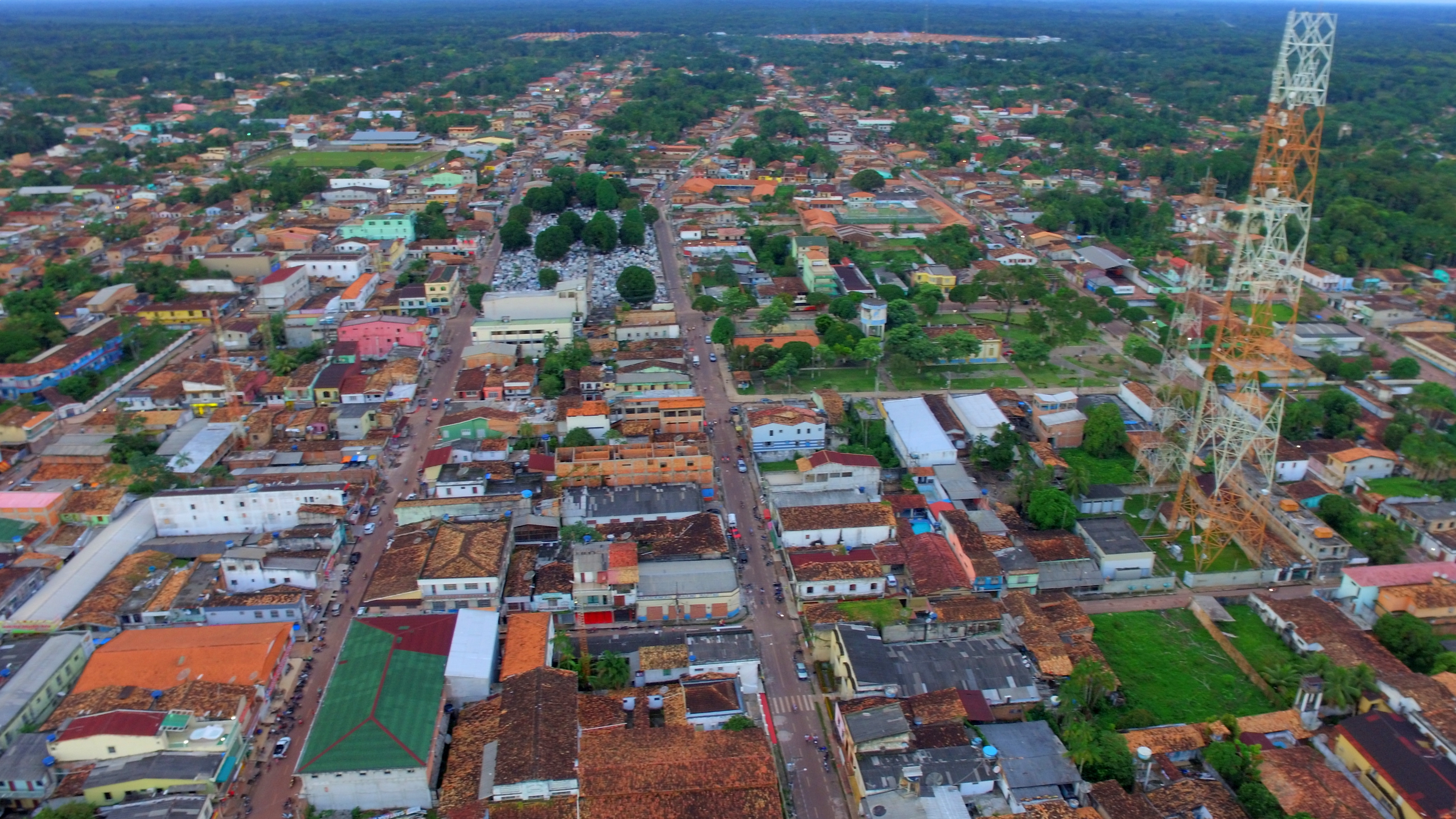 Miri